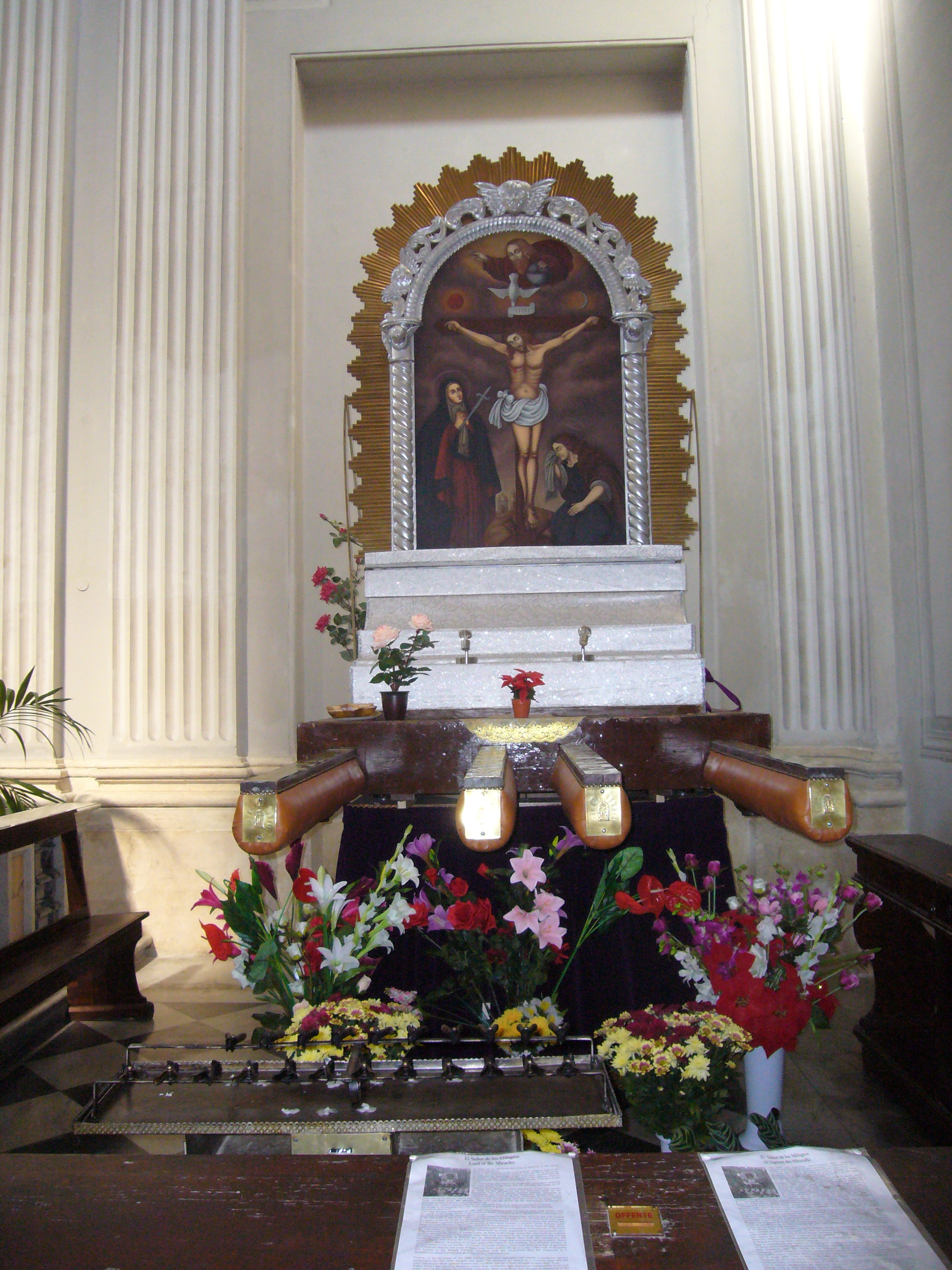 Roma, santa Maria della Luce, altare e portantina del Señor de los Milagros